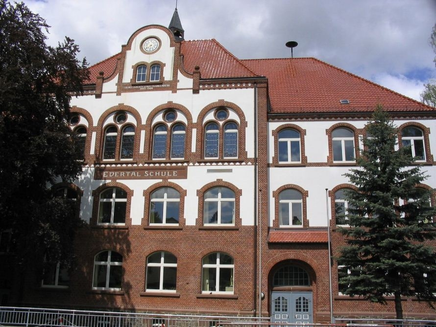 Edertalschule in Frankenberg/Eder